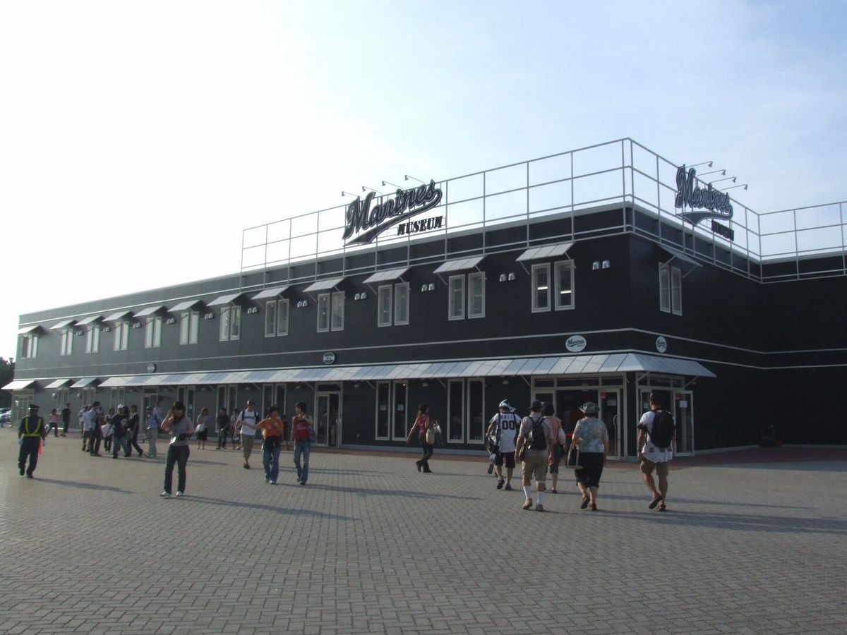 利用者:ROGによる撮影（2006年8月18日撮影） 2006年8月19日 (土) 00:36 . . ROG . . 1200×900 (130,757 バイト)